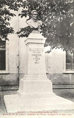 CPA Loritz